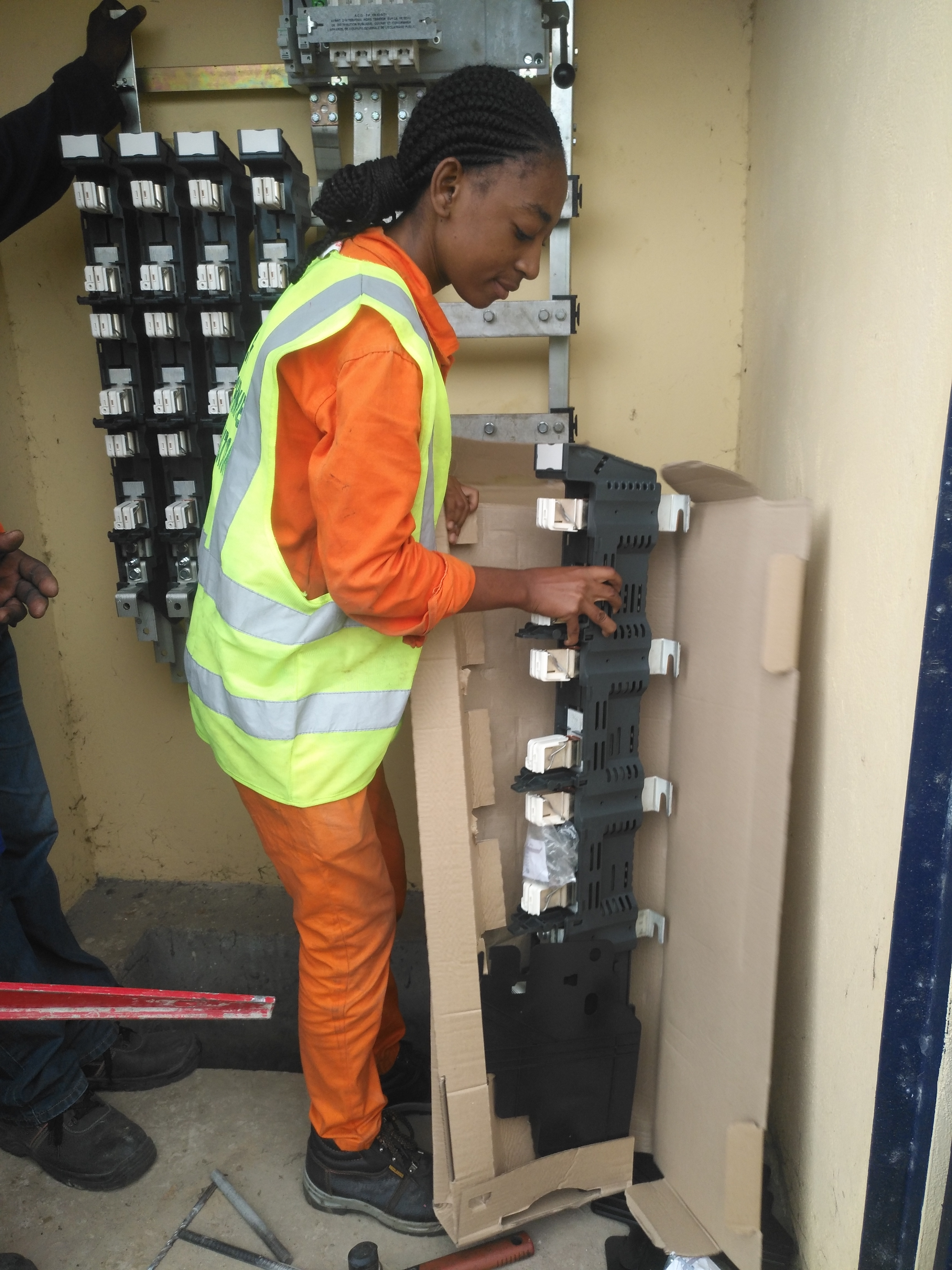 Français cadien: Je suis de nationalité Congolaise de Brazzaville je suis électricien de profession je suis dans une Société Nationale d'électricité de mon pays ou je fais la rencontre d'une fille dans mon service de la moyenne tension ou en travail avec une tension plus élevé de 20kv a 15kv cette fille ma beaucoup intéressé par le travail qu'elle fesait.elle aimé sont travail et le fesait avec amour elle était toujours fidèle a son poste aucun jour elle a manqué a sont poste malgré c'est un travail dangereux mais elle su garde son calme et faire l'essentiel merci a tous pour la lecture de mon sujet This is an image with the theme "Play" from: Congo